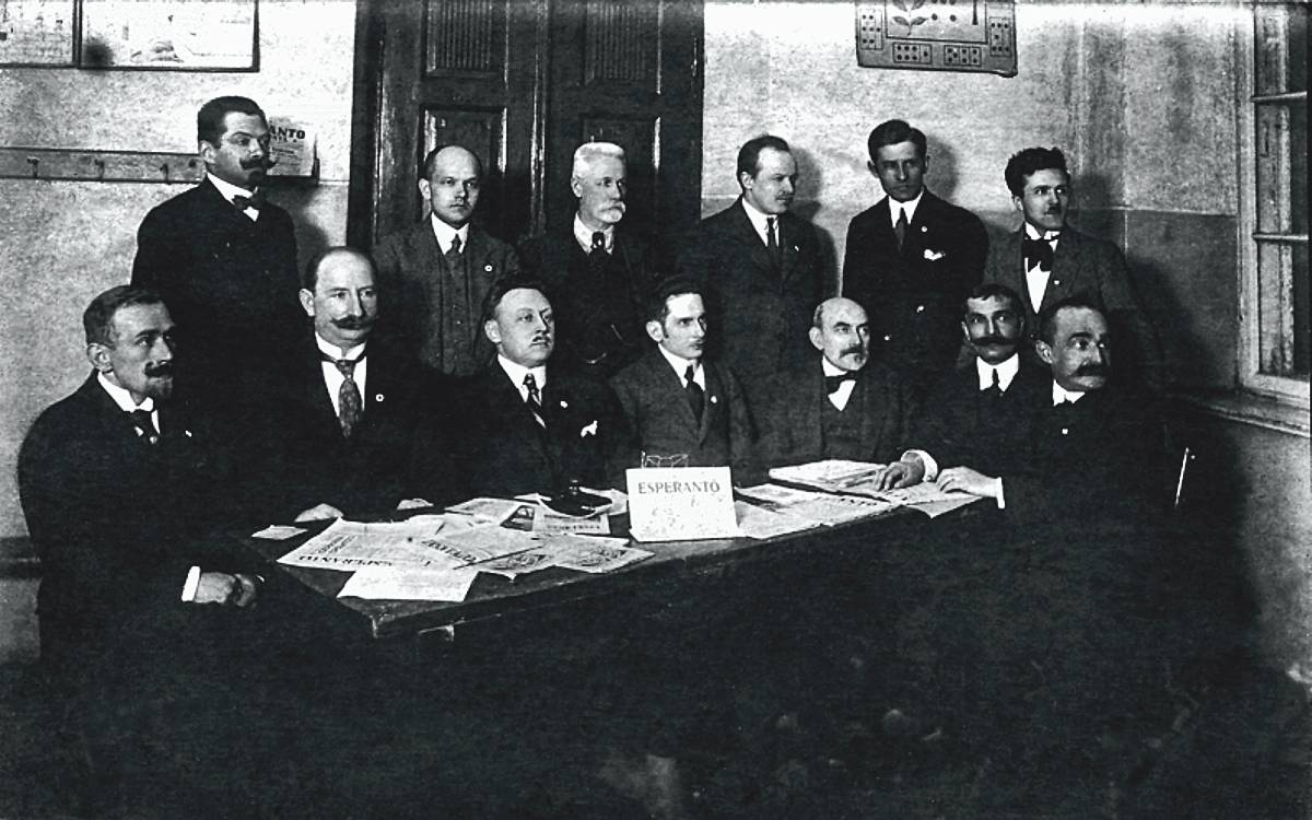 Warszawscy esperantyści, zdjęcie grupowe z Wielkanocy 1922 r. Woyde, Czubrynski, Jan Günther, Kaz. Tyminski, Wlodz. Pfeiffer, W. Miernicki, St. Karolczyk, St. Essigman, Jerzy Loth, Jan Kostecki, Leo Belmont, S. Stankiewicz, S. Karlsbach.